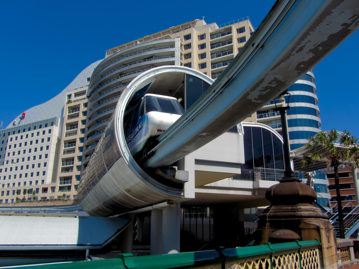 Sydney IMG_1579